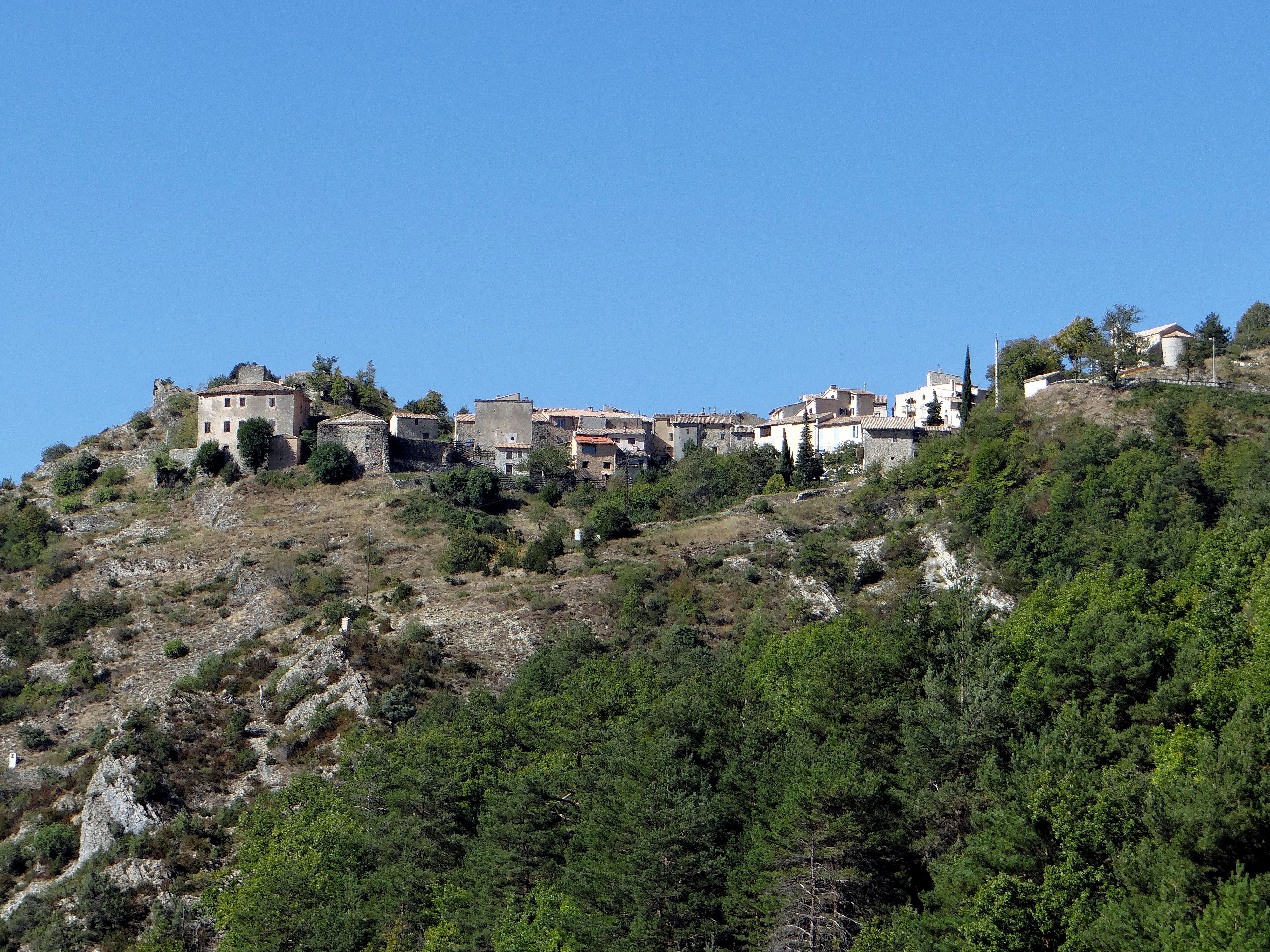 Le Mas - Vue du village